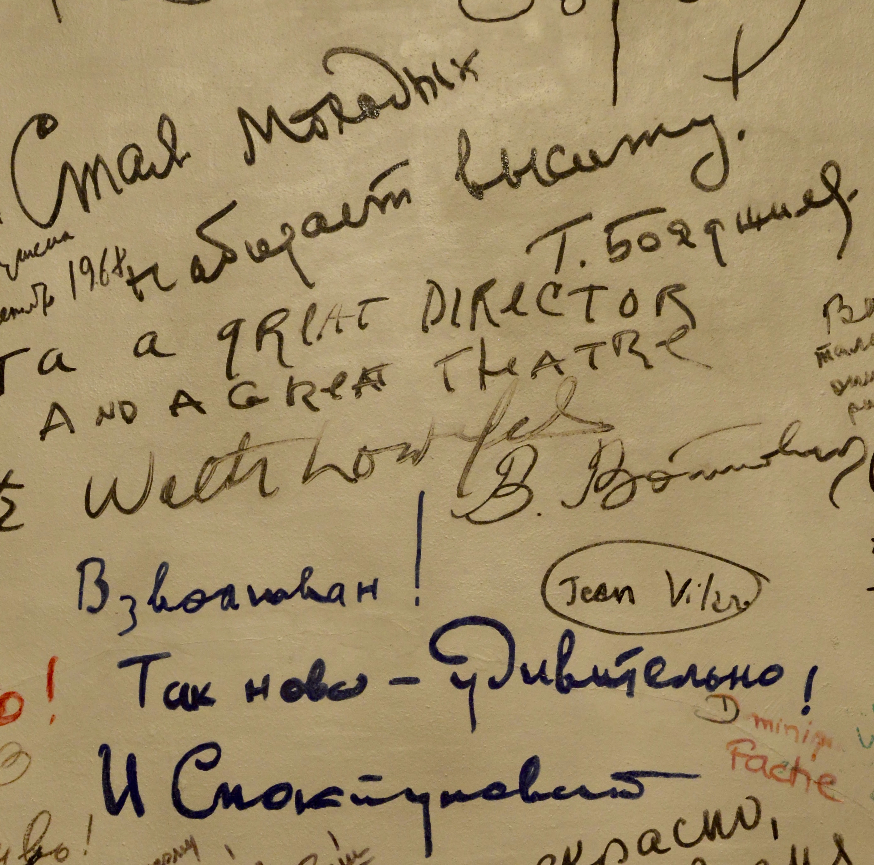 Кабинет Юрия Любимова в театре на Таганке